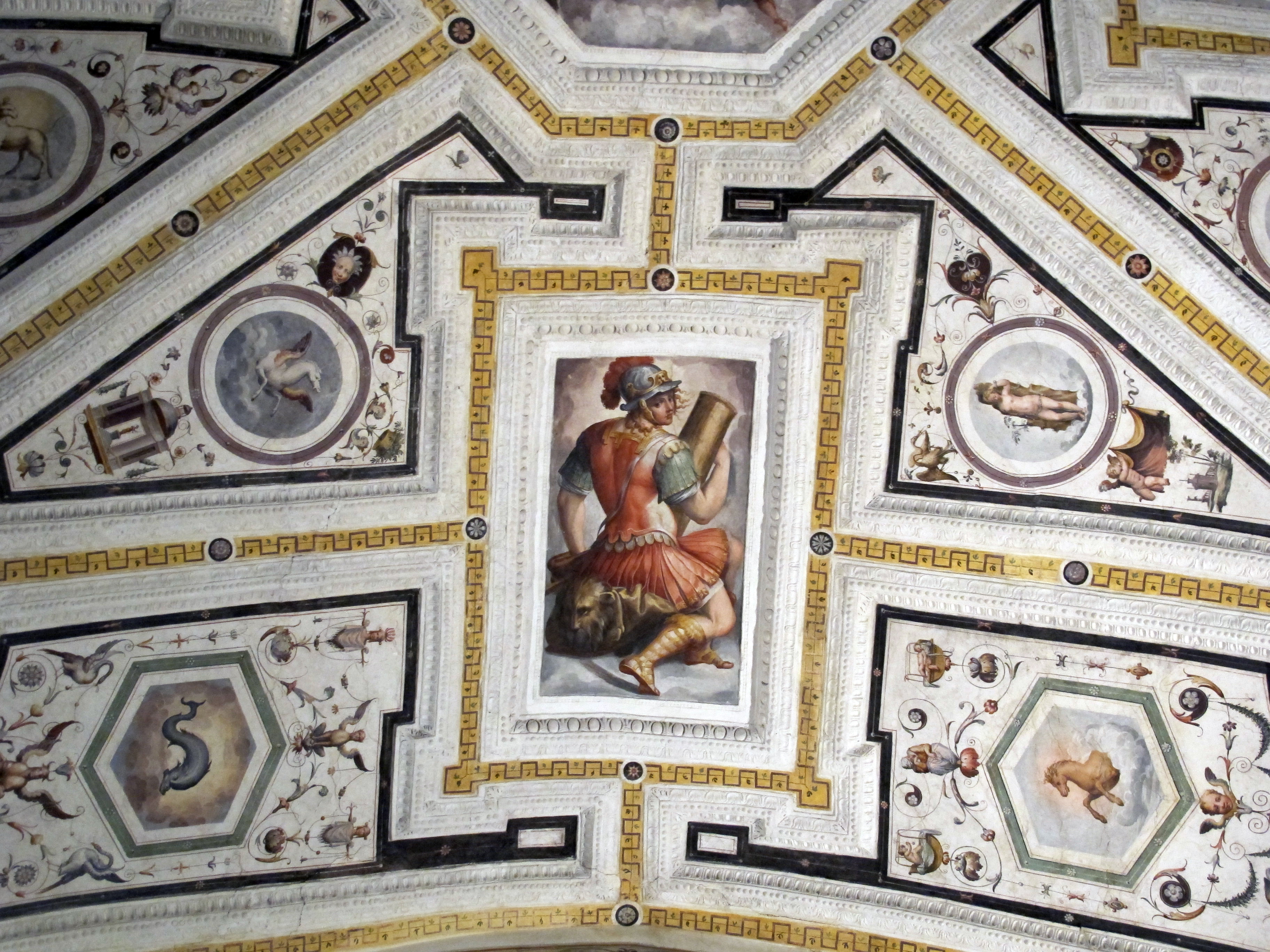 Vasari's Vestry